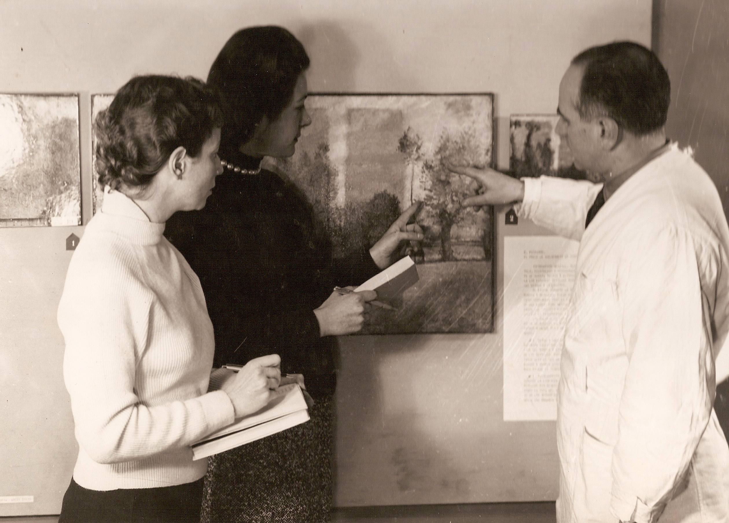 El restaurador del Museo Nacional de Bellas Artes, Juan Corradini, le explica el proceso de restauración a unas colaboradoras. Alrededor del año 1960.